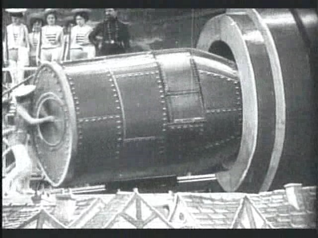 Méliès, viaggio nella luna (1902) 04